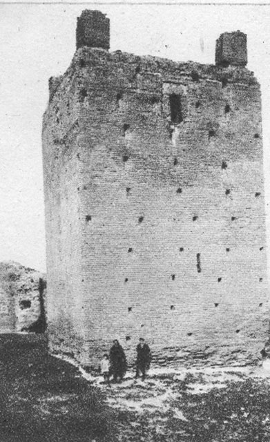 Castillo - Foncastín (Valladolid) - España Turística y Monumental / Cuarto álbum / Las Bellezas de Castilla / Región Leonesa - Cromo 50 x 70 Sepia